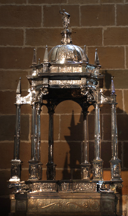 custodia renacentista pamplona